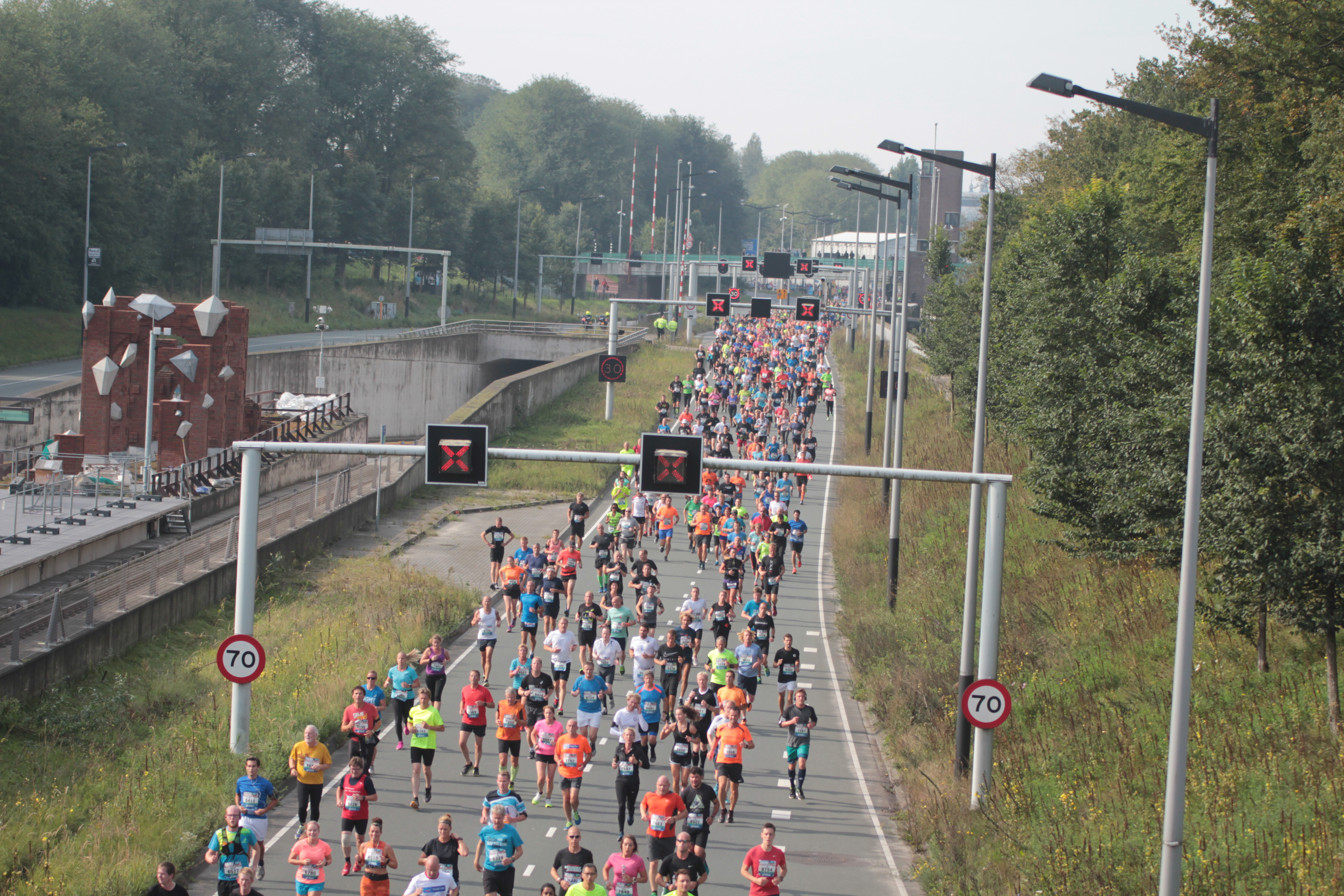 De Nieuwe Leeuwarderweg, met hardlopers van de Dam tot Damloop